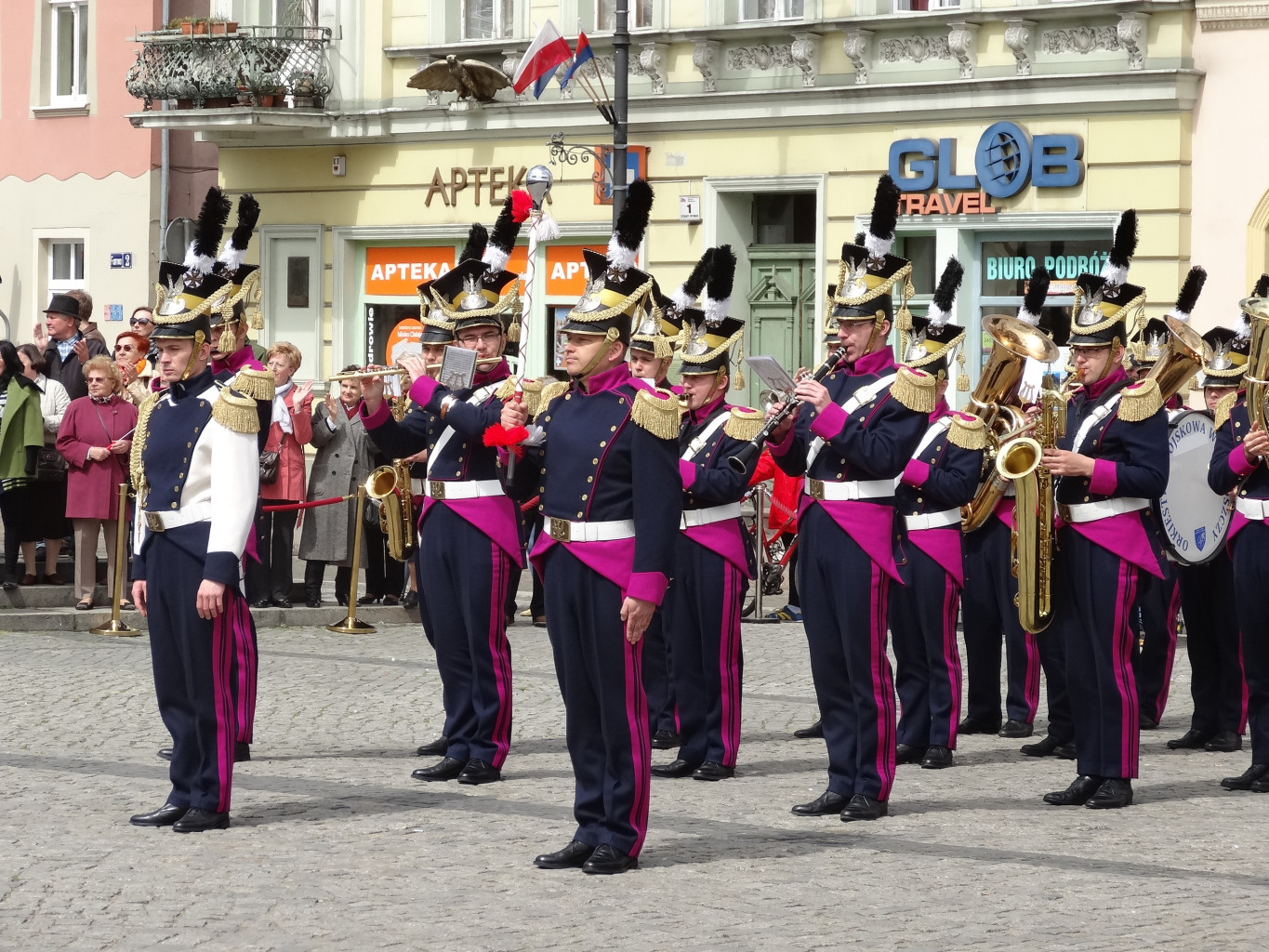 Święto Konstytucji 3 Maja 2014 roku na Starym Rynku w Bydgoszczy z udziałem orkiestry wojskowej garnizonu bydgoskiego oraz Zespołu Pieśni i Tańca Ziemia Bydgoska